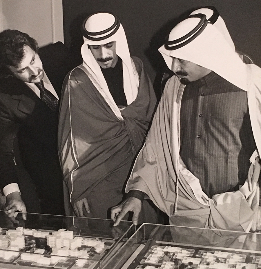 وصورة له مع سمو الشيخ خليفة بن حمد آل ثاني